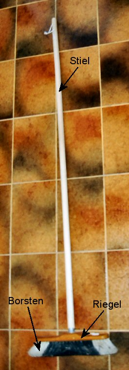 Besen